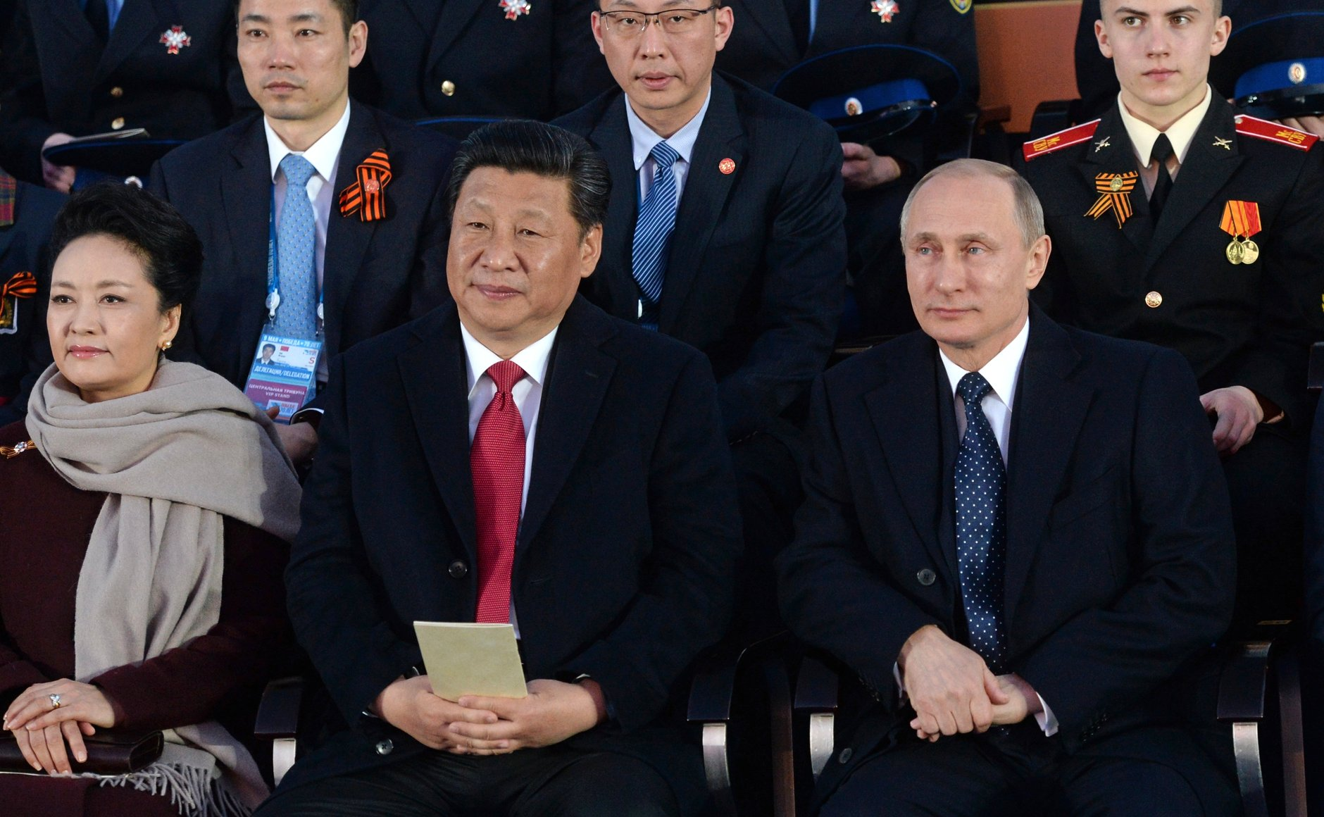 Концерт в честь 70-летия Великой Победы